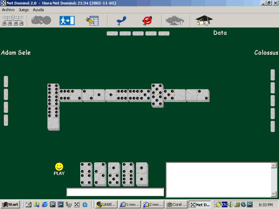 La mesa de juego de Net Dominó